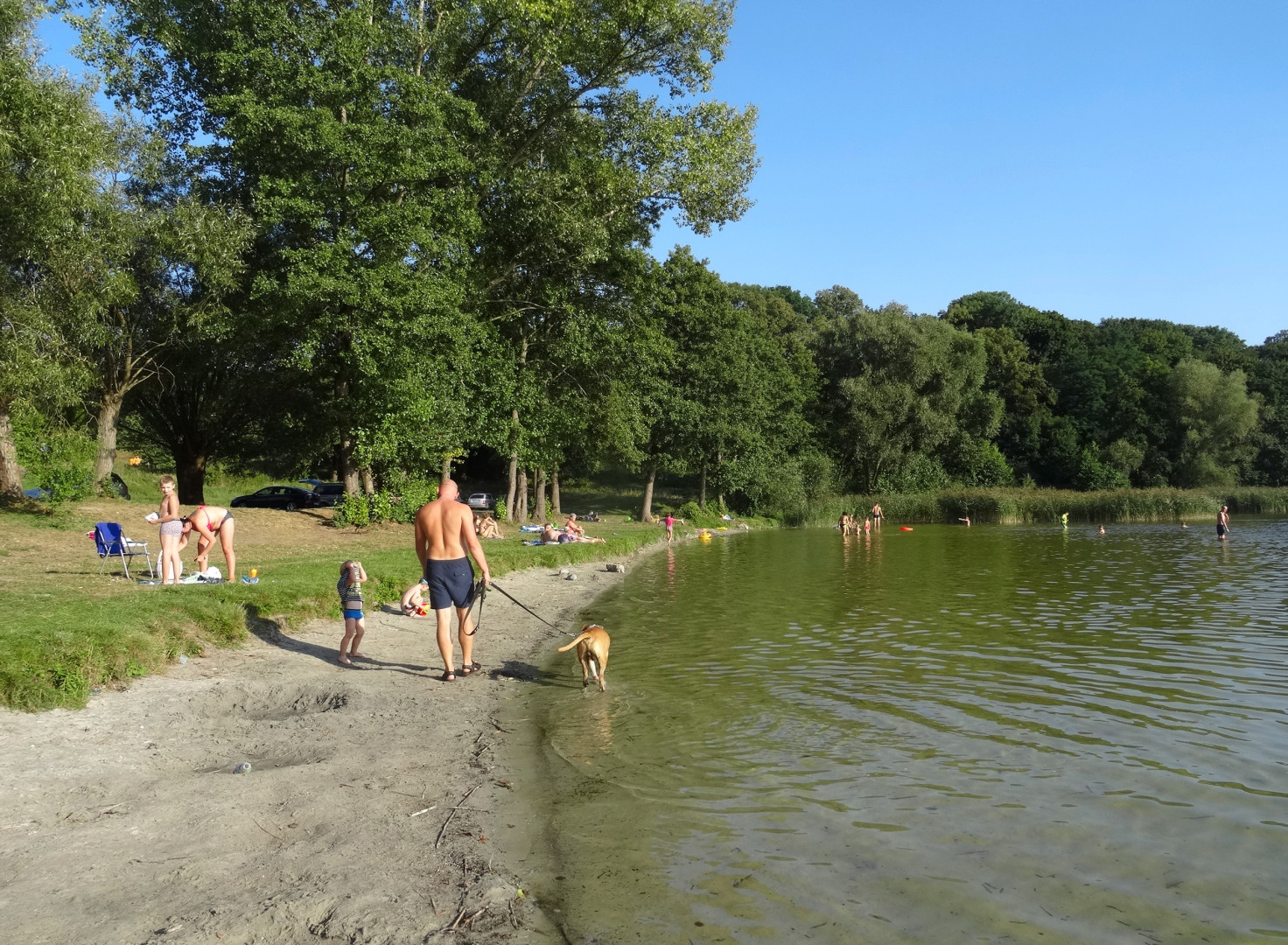 Jezioro Wierzchucińskie Duże w gminie Sicienko, powiat bydgoski